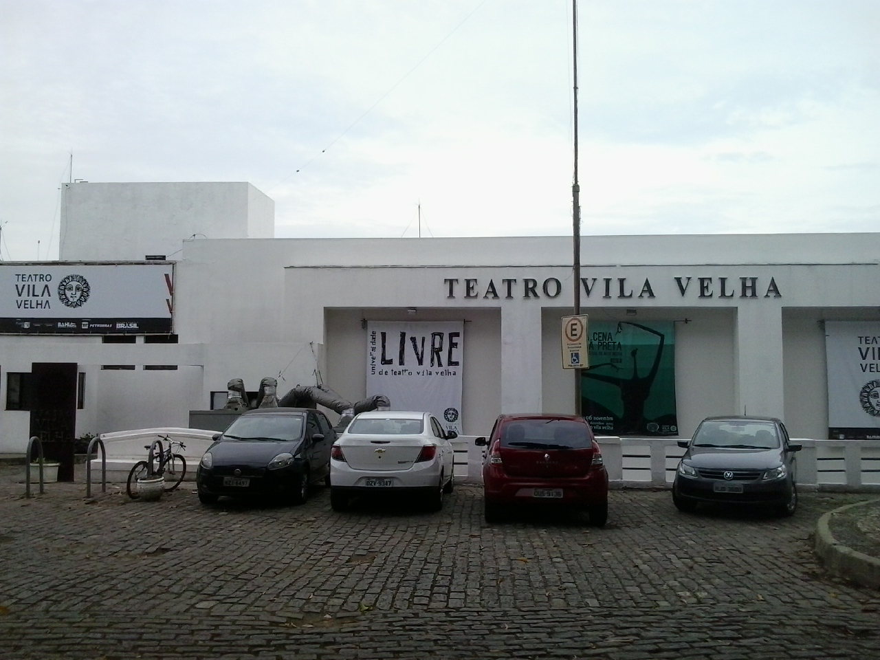 Teatro Vila Velha, no Passeio Público em Salvador, Bahia, Brasil.